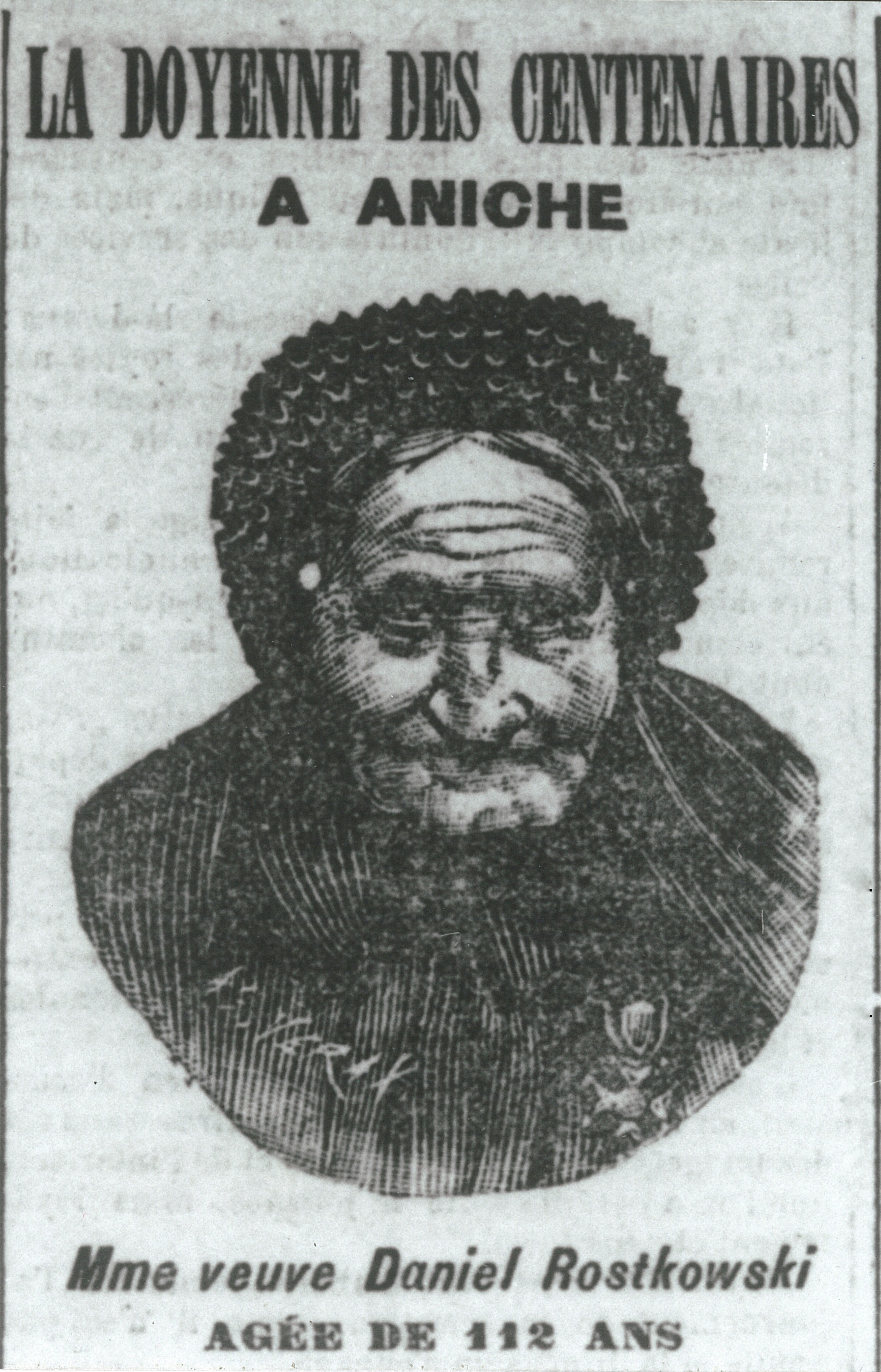 Reproduction d'un portrait de Joséphine Rostkowska illustrant un article paru à la une dans le "Grand Écho du Nord et du Pas-de-Calais", daté du 2 décembre 1895. Coll. Bibliothèque Municipale de Lille.